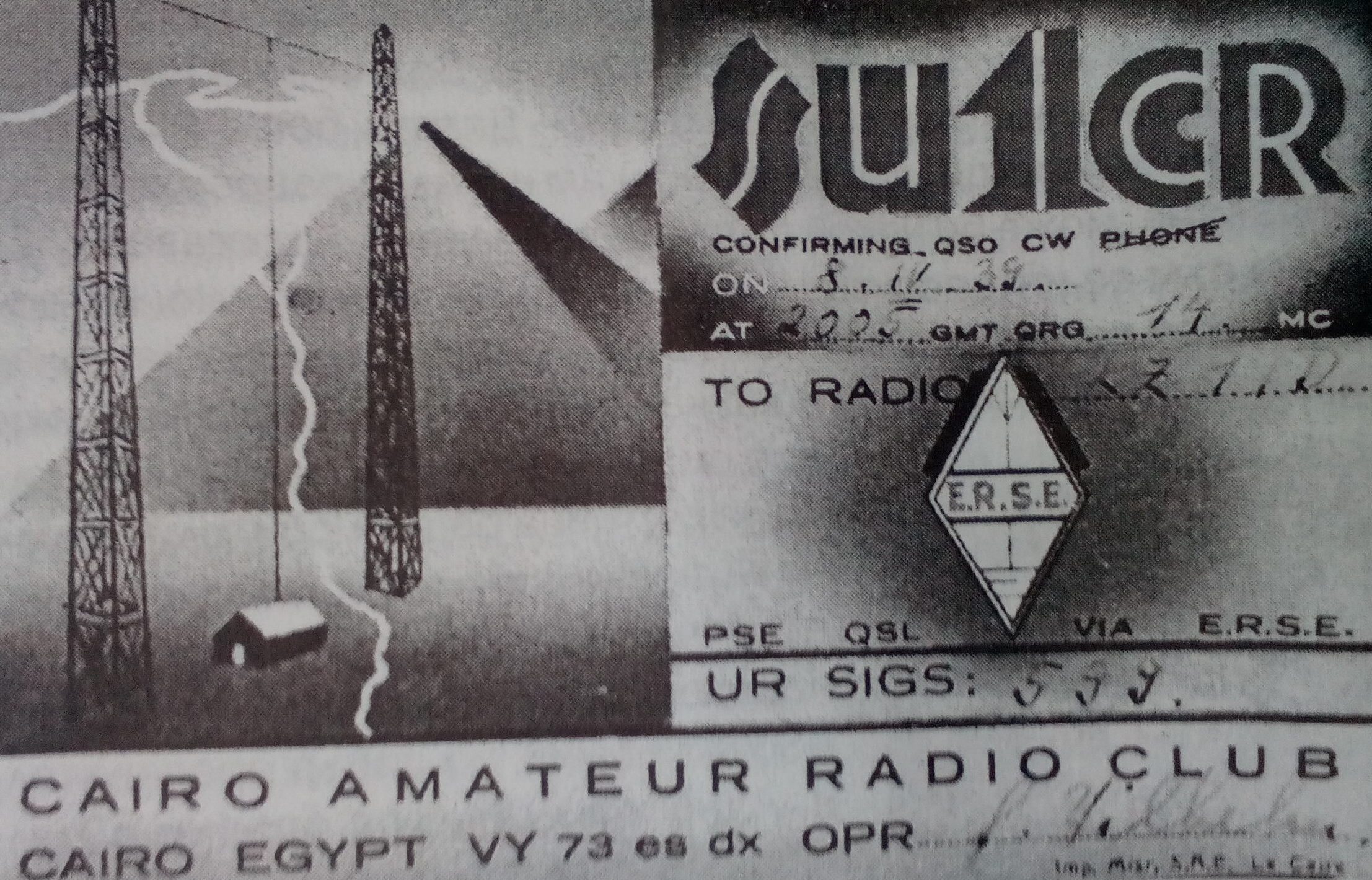 Една от първите QSL-картички на Иван Джаков (LZ1ID) от 8 април 1939 г.